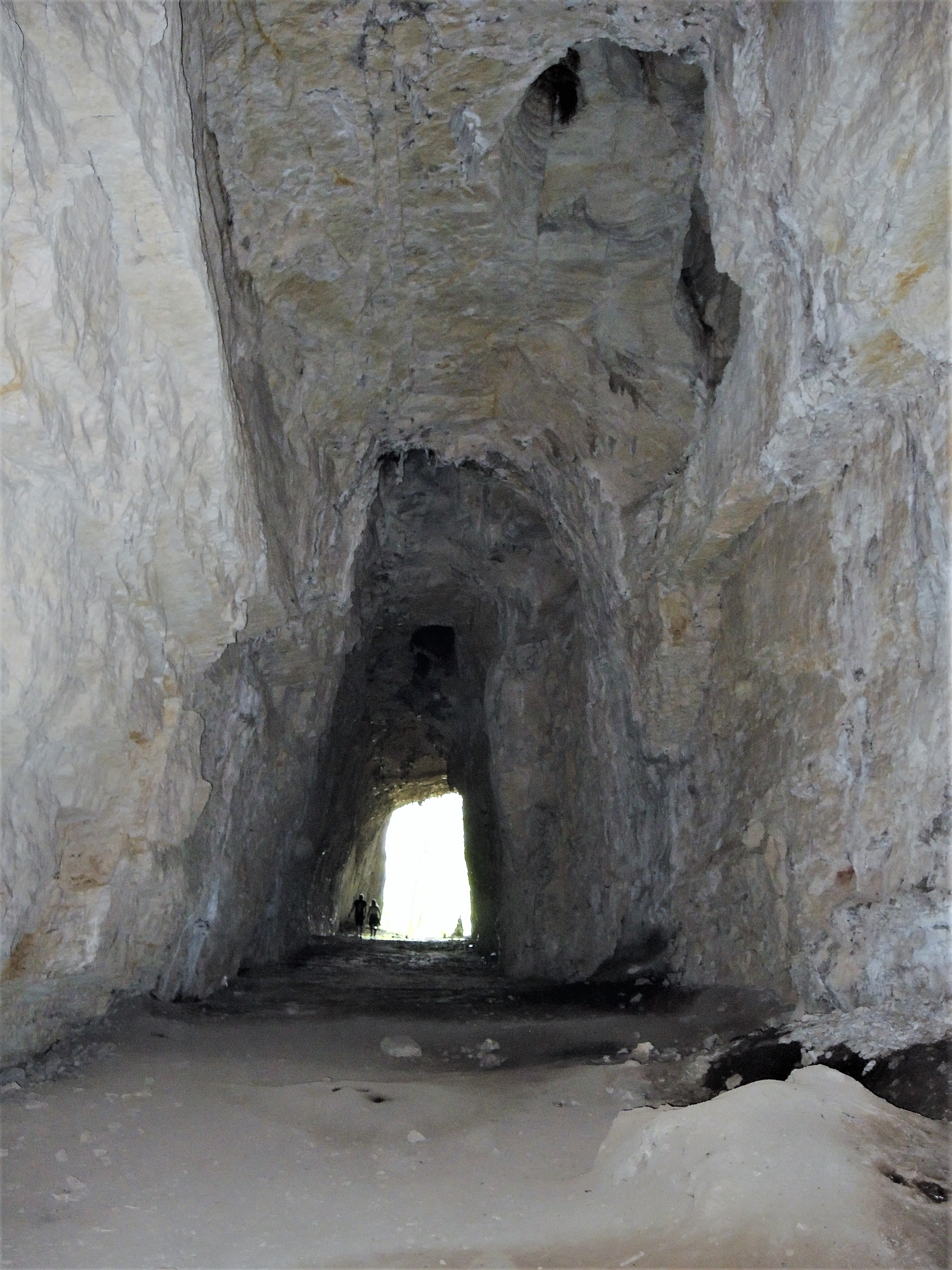 Intérieur de la grotte du château de la roche, vu du fond de la cavité. Soulce-Cernay. Doubs